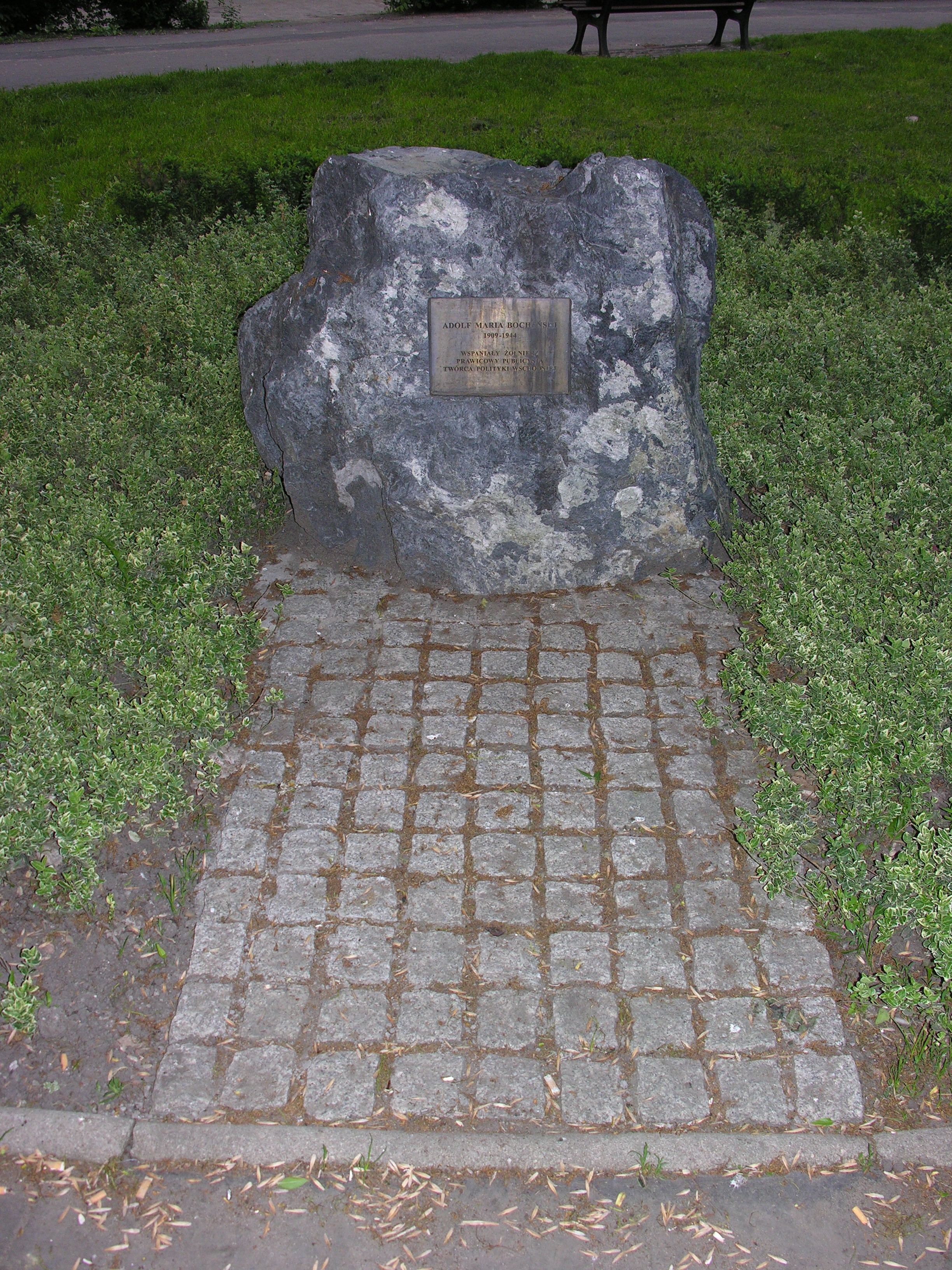 Kamień pamiątkowy Adolfa Marii Bocheńskiego na skwerze jego imienia we Wrocławiu